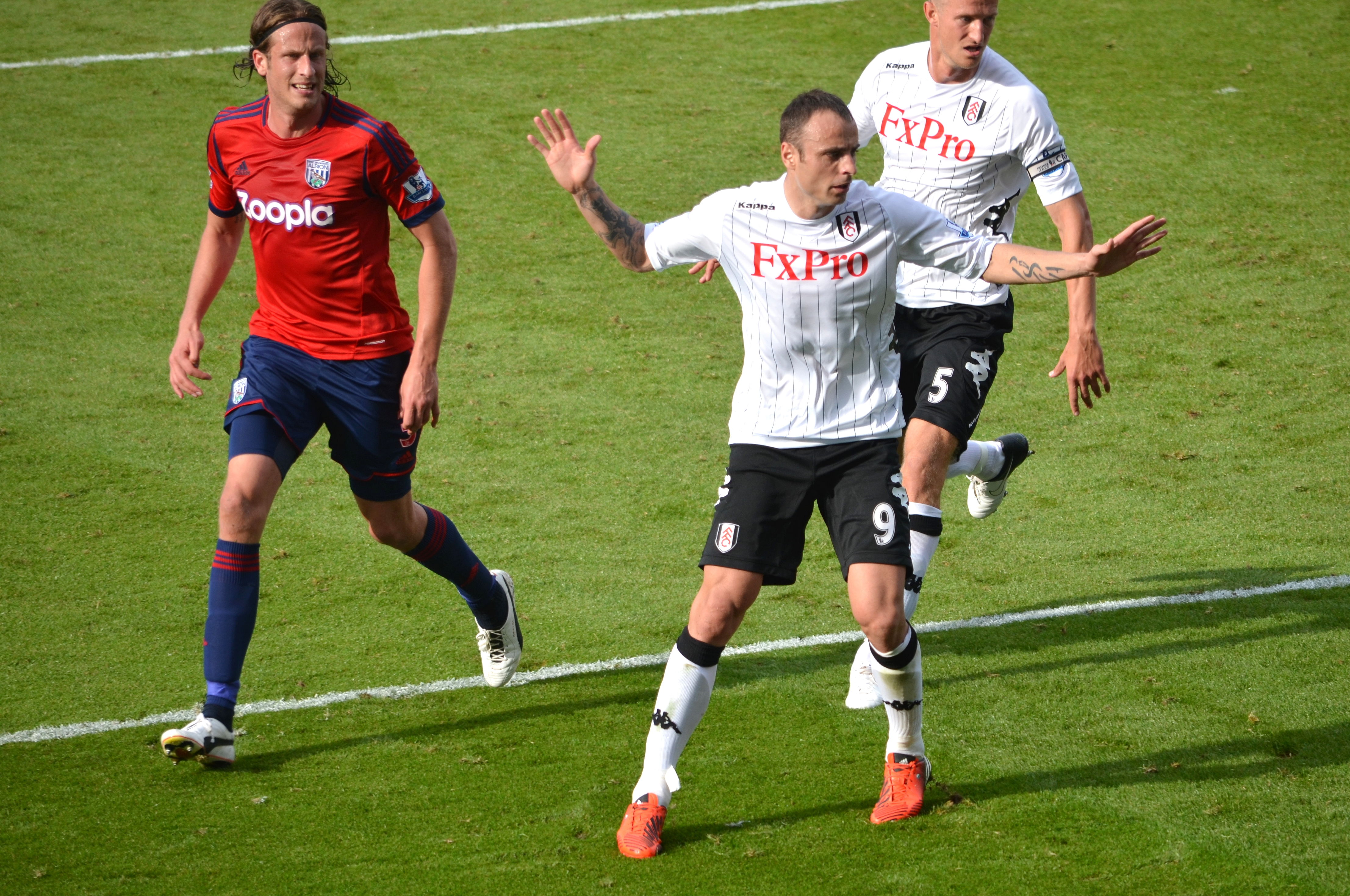 Craven Cottage, September 2012